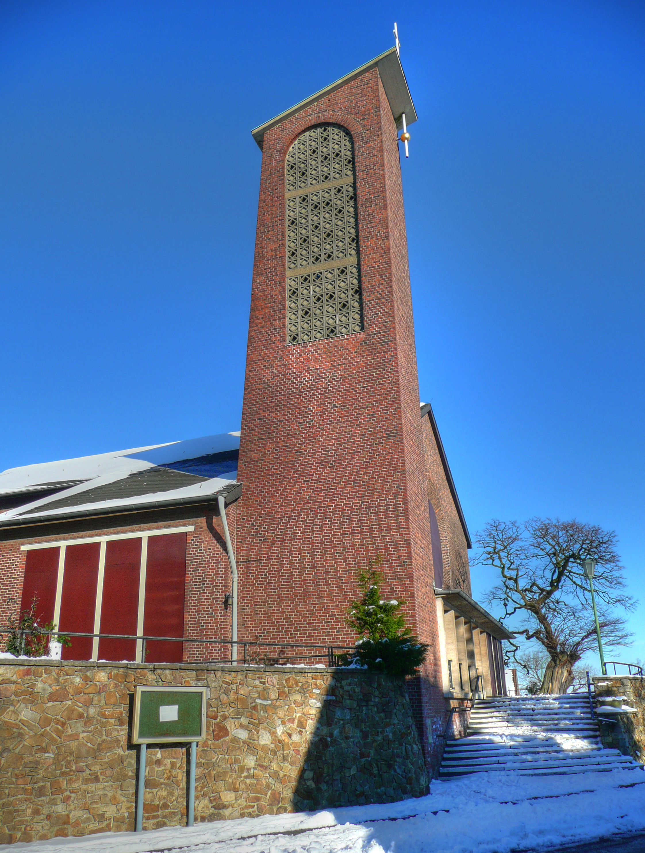 Turm der Pierer Pfarrkirche)